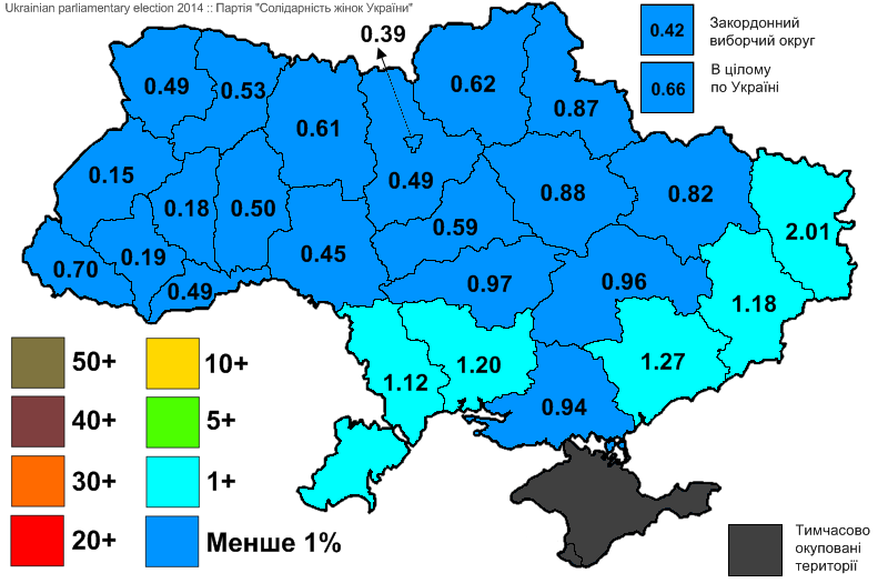 Результати виборів до Верховної Ради України, які відбулись 25 жовтня 2014 року. Інформація з офіційного сайту ЦВК. Партія "Солідарність жінок України".